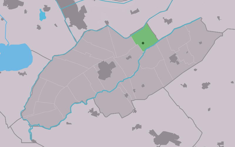 Kaartsje fan himrik fan Nijeholtpea